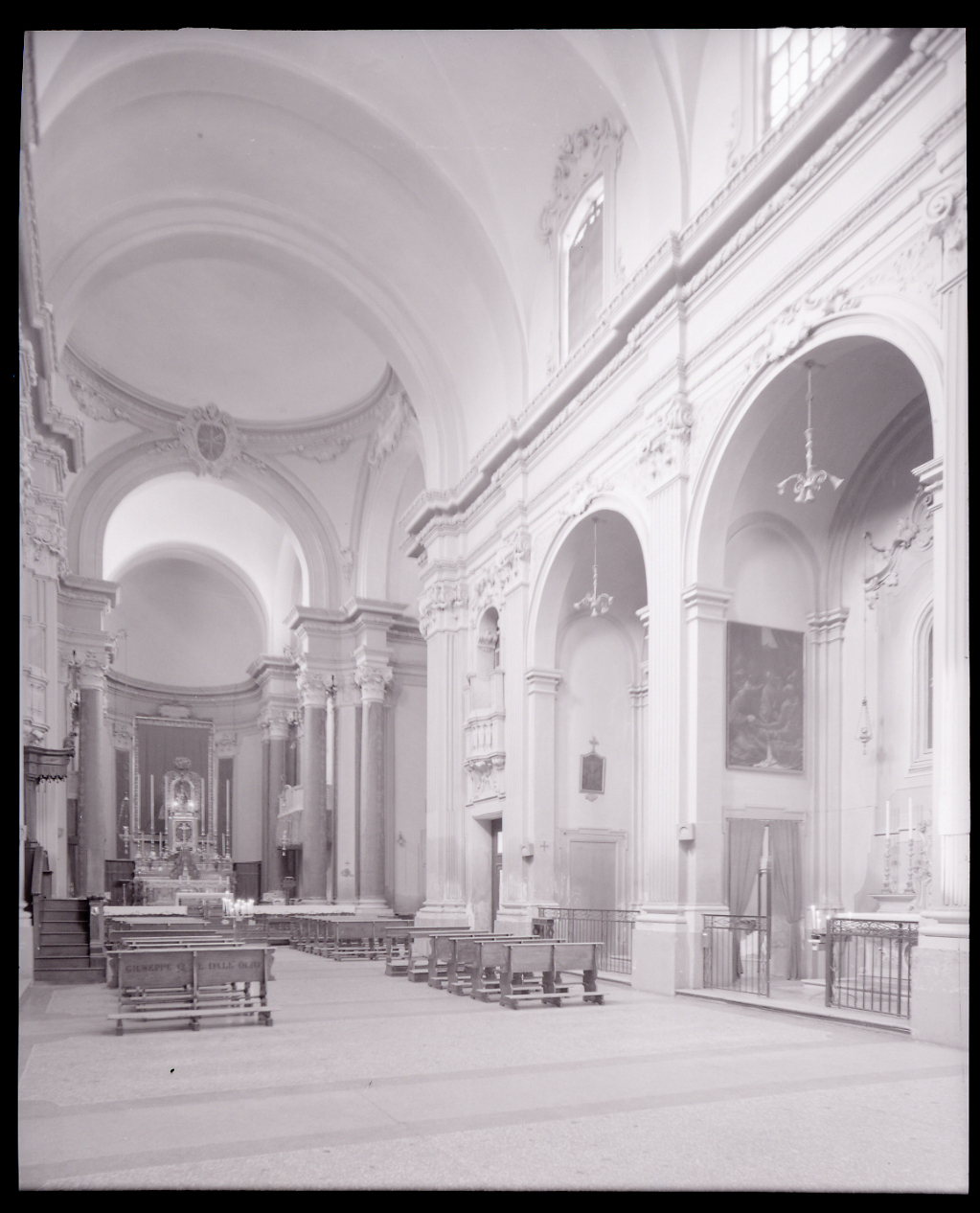 Servizio fotografico : Bologna, 1968 / Paolo Monti. - Buste: 20, Fototipi: 21 : Negativo b/n, gelatina bromuro d'argento/ pellicola ; 10x12. - ((Serie costituita da 21 negativi identificati con i nn.: 14749-14758bis, 14759-14767. La suddetta serie è contenuta nella scatola identificata con la numerazione 14501-15000G. - Occasione: Documentazione per la pubblicazione: Anna Maria MATTEUCCI, Carlo Francesco Dotti e l'architettura bolognese del Settecento, Bologna, Edizioni Alfa, 1968. - Fonte: Monografia di Matteucci, Anna Maria: Carlo Francesco Dotti e l'architettura bolognese del Settecento, Bologna, Edizioni Alfa (1968)